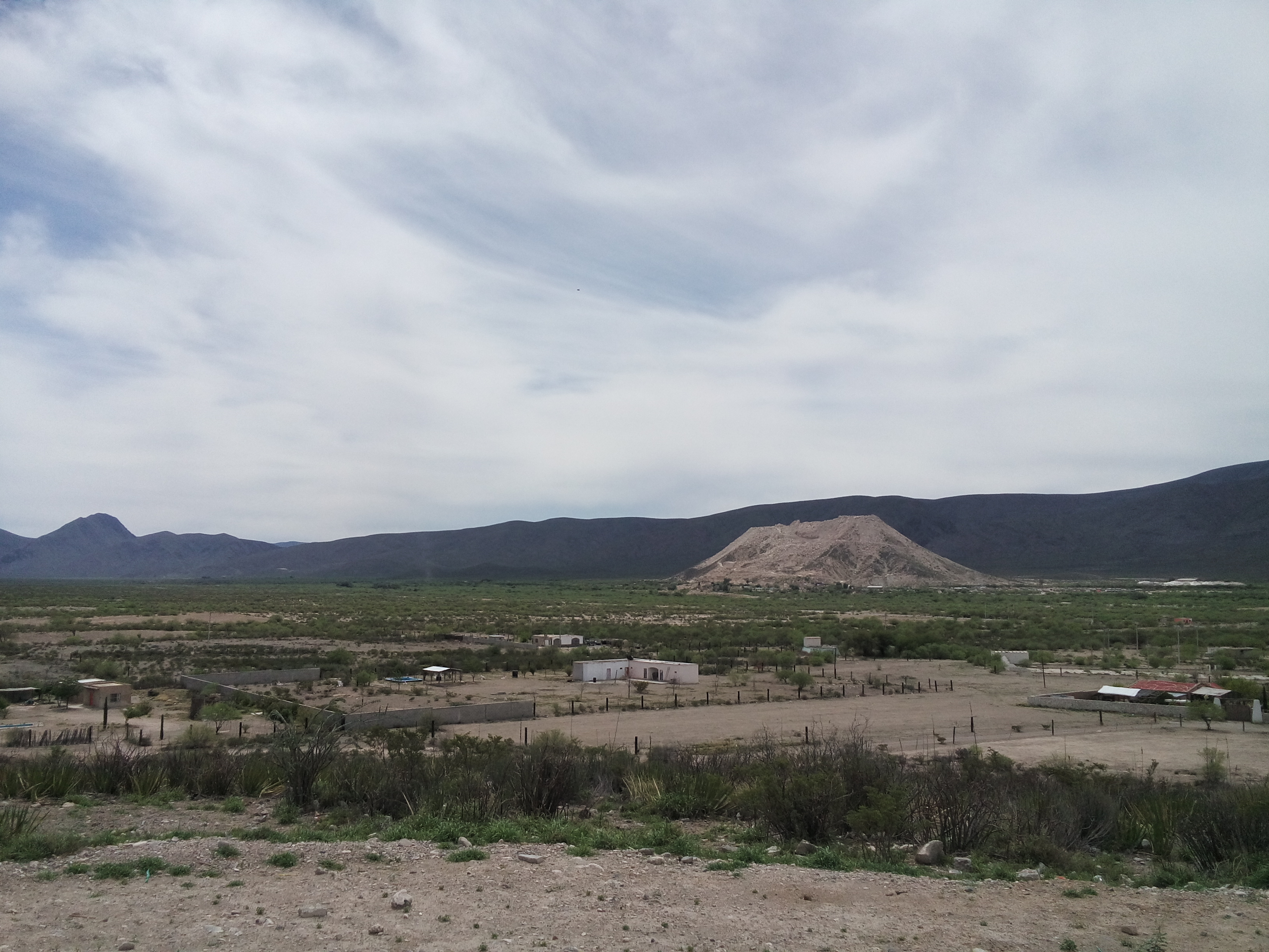 Cañon de Jimulco